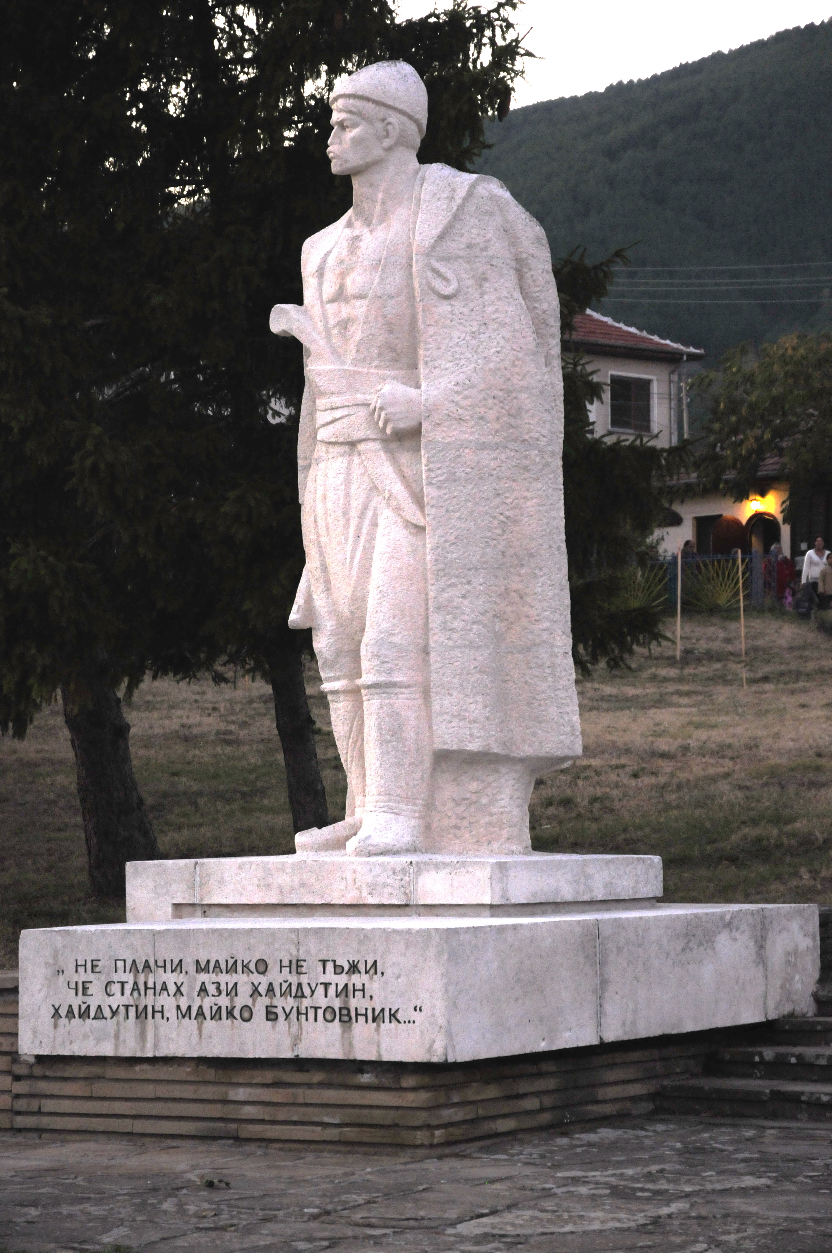 Паметникът на Пею Буюклията в кв. Козарево